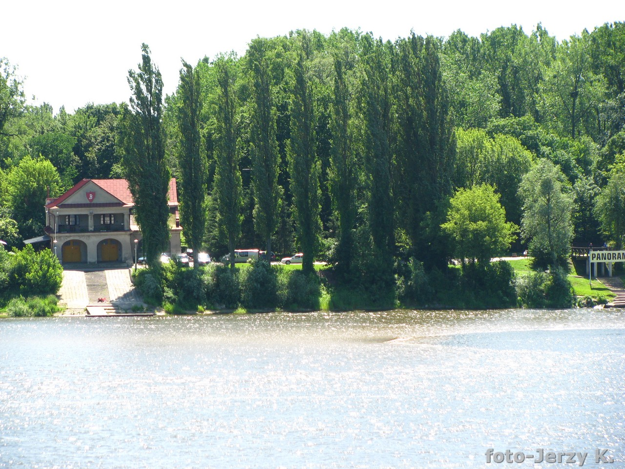 dawniej Przystań Budowlanych (lato 2009)